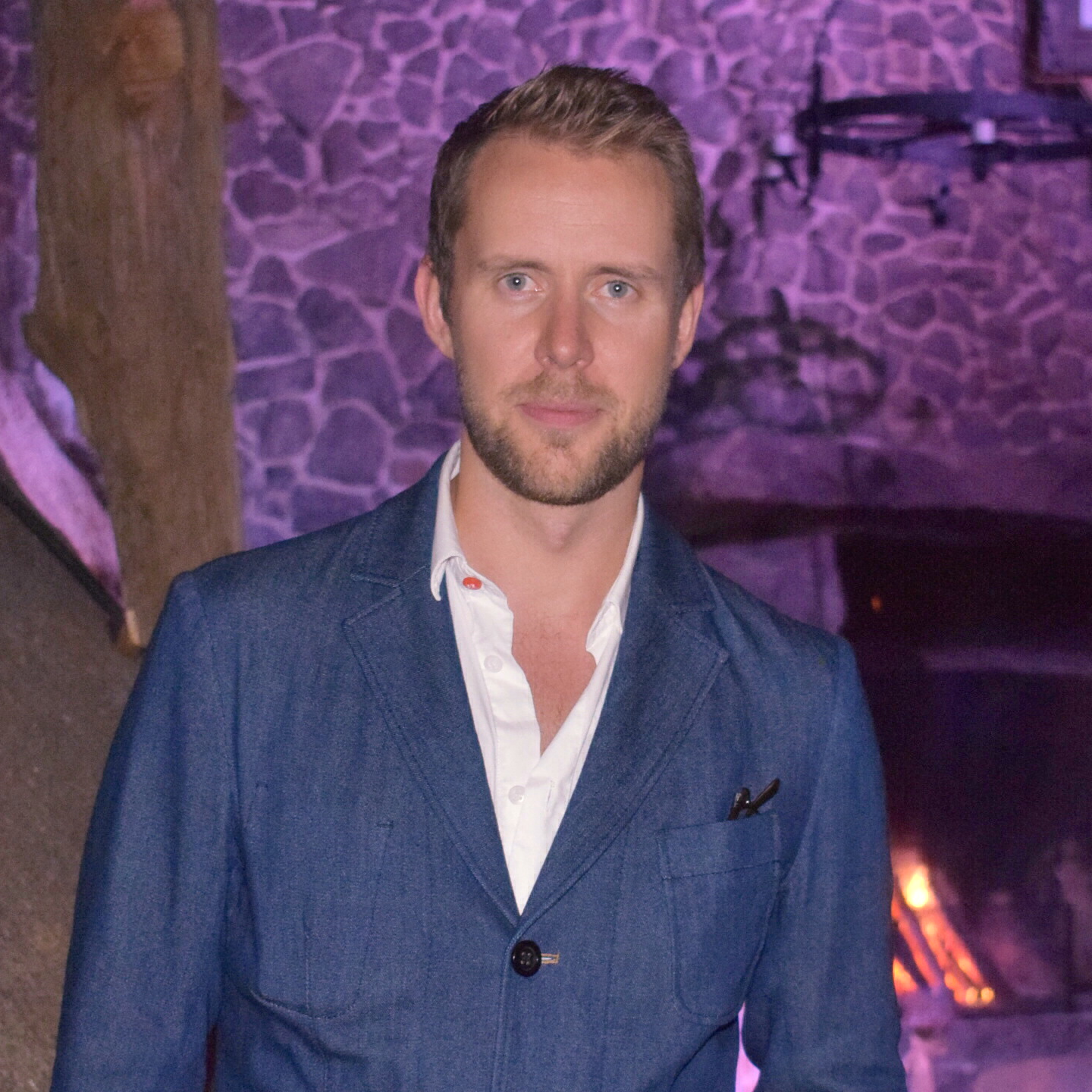 Järvisydän, Suomi. Kuvattu 27.10.2017